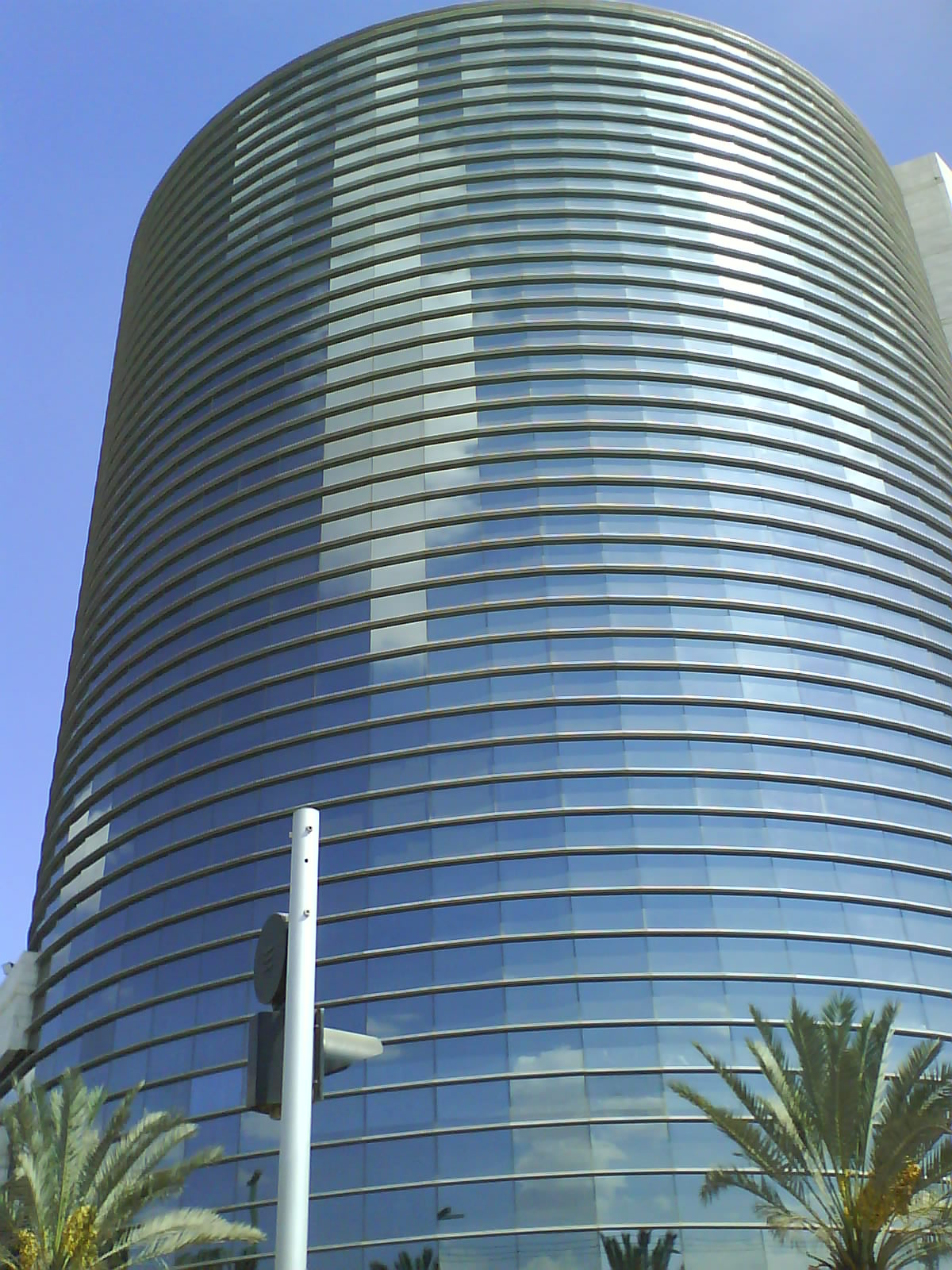 Negev Mall Tower, Be'er Sheva, Israel